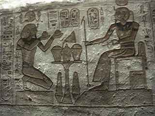 Abou Simbel, le temple de Ramses II : scène d'offrande - Égypte Abou Simbel